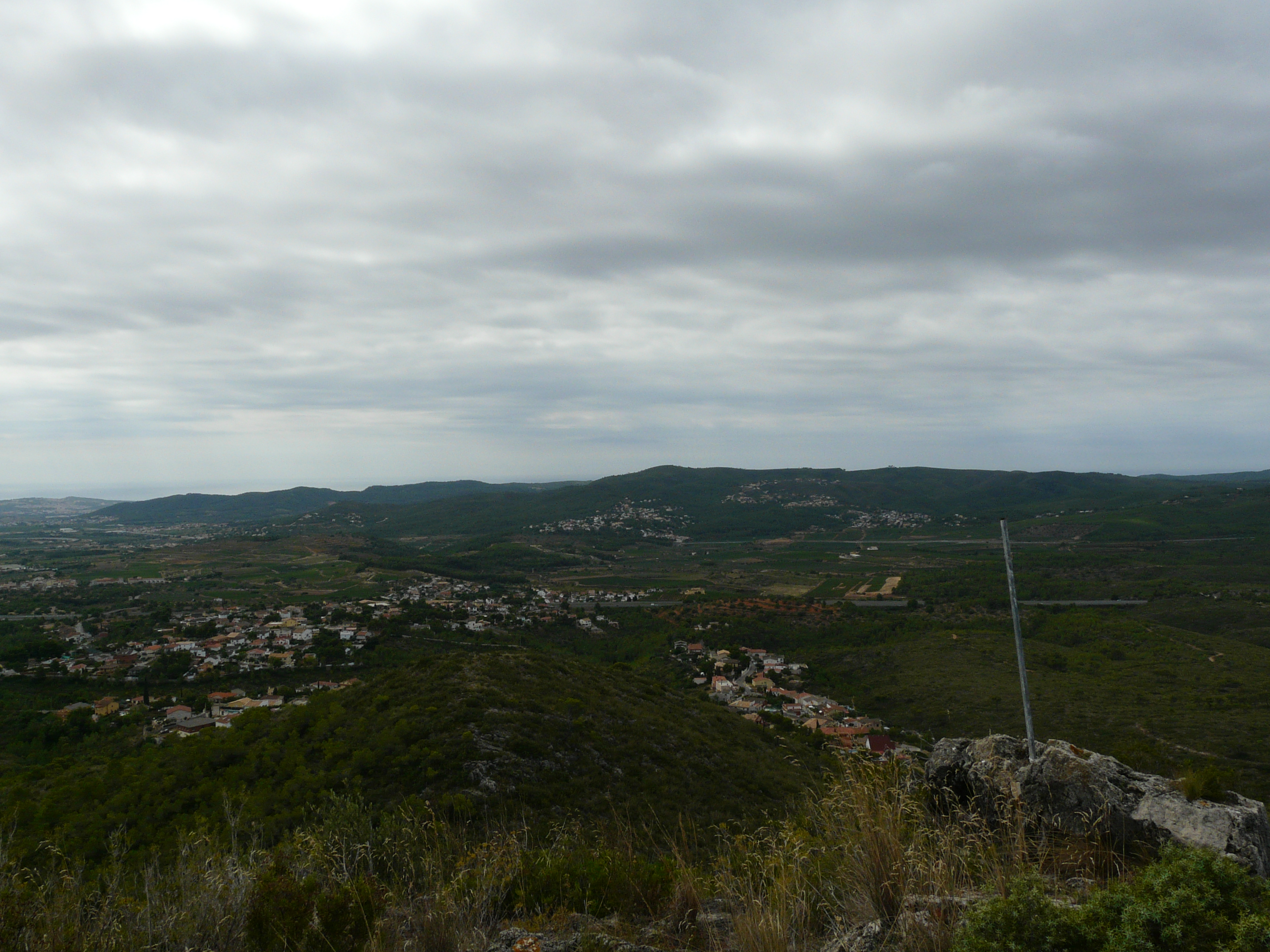 Imatges preses en una excursió al Puig Francàs des del Priorat del Penedès (la Bisbal del Penedès, Baix Penedès). Mirant cap al sud, s'hi veu el